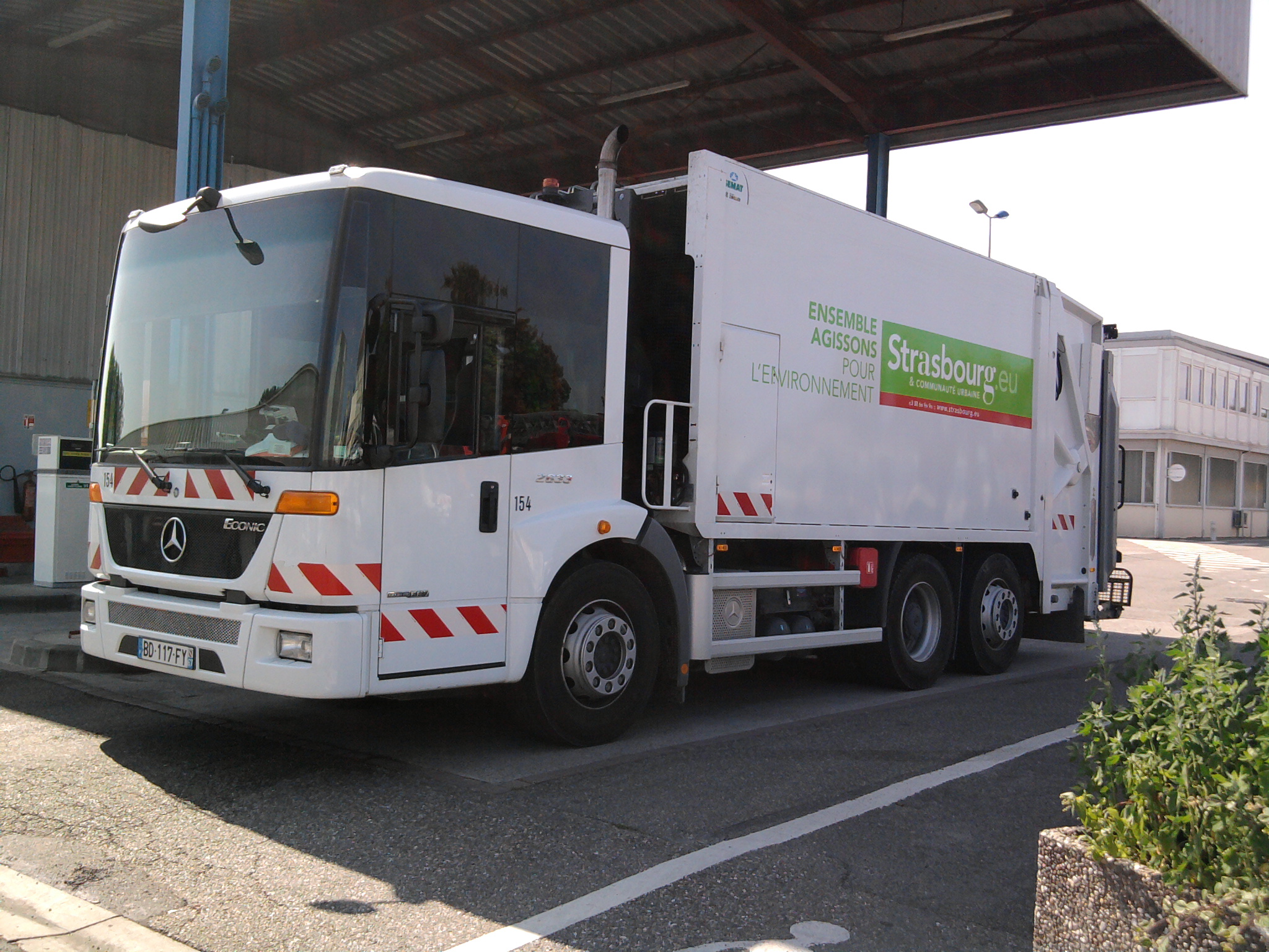 Un camion poubelle Mercedes-Benz Econic de la communauté urbaine de Strasbourg